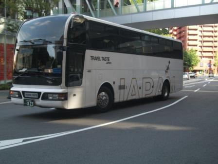 トラベル・テースト・ジャパンの貸切車